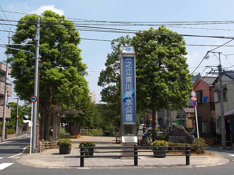 Ichinoe-Sakaigawa Shinsui Koen （一之江境川親水公園：River side Park）